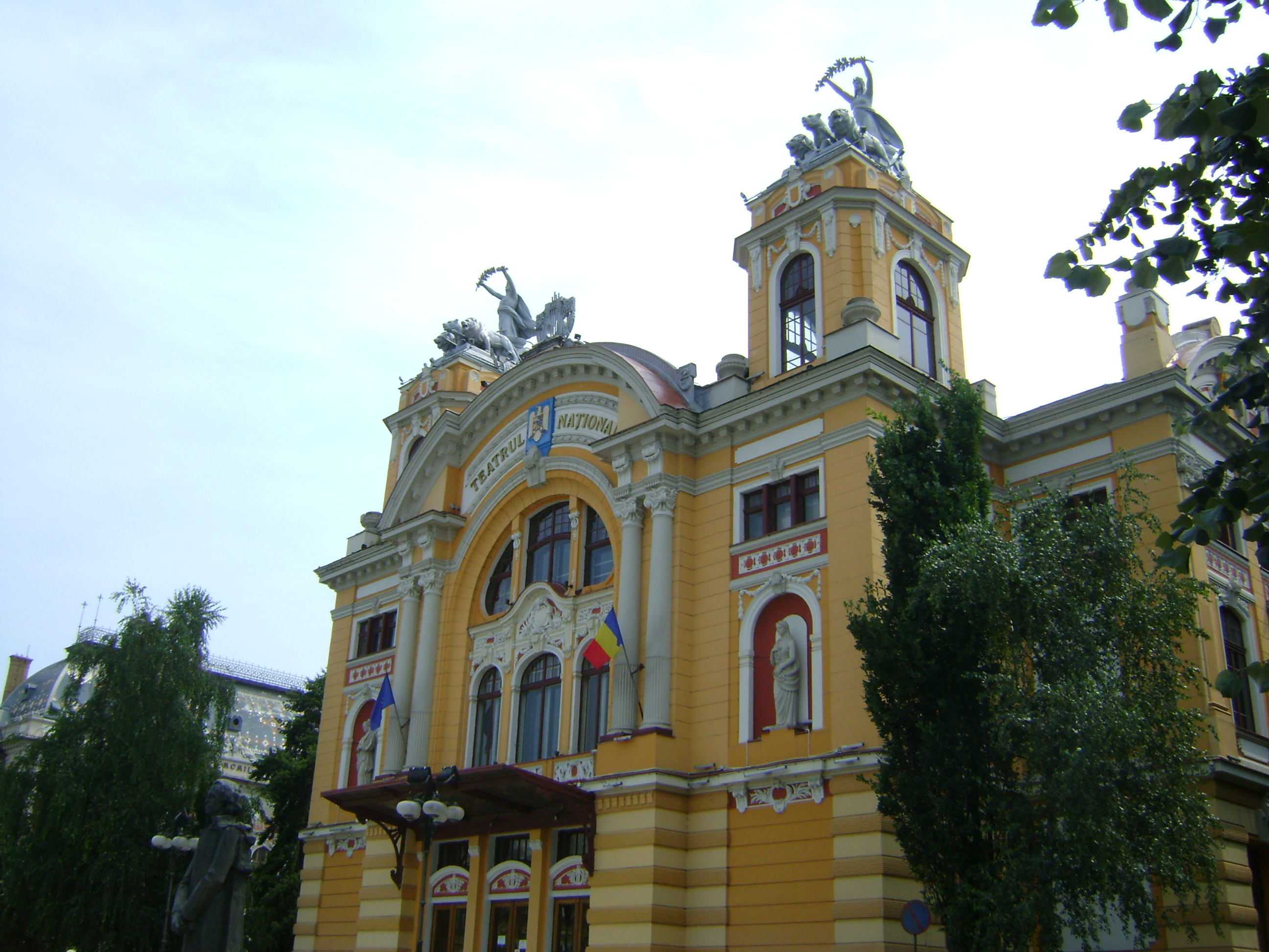 ormată în urma Unirii Transilvaniei cu România în 1918 sub numele de Teatrul Național, compania se demarcă prin faptul că este prima companie de teatru de limbă română din Cluj. Data înființării companiei se consideră a fi 14 mai 1919 când Tiberiu Brediceanu i-a cerut lui Onisifor Ghibu[1] să preia edificiul teatrului în numele Consiliului Dirigent Român.